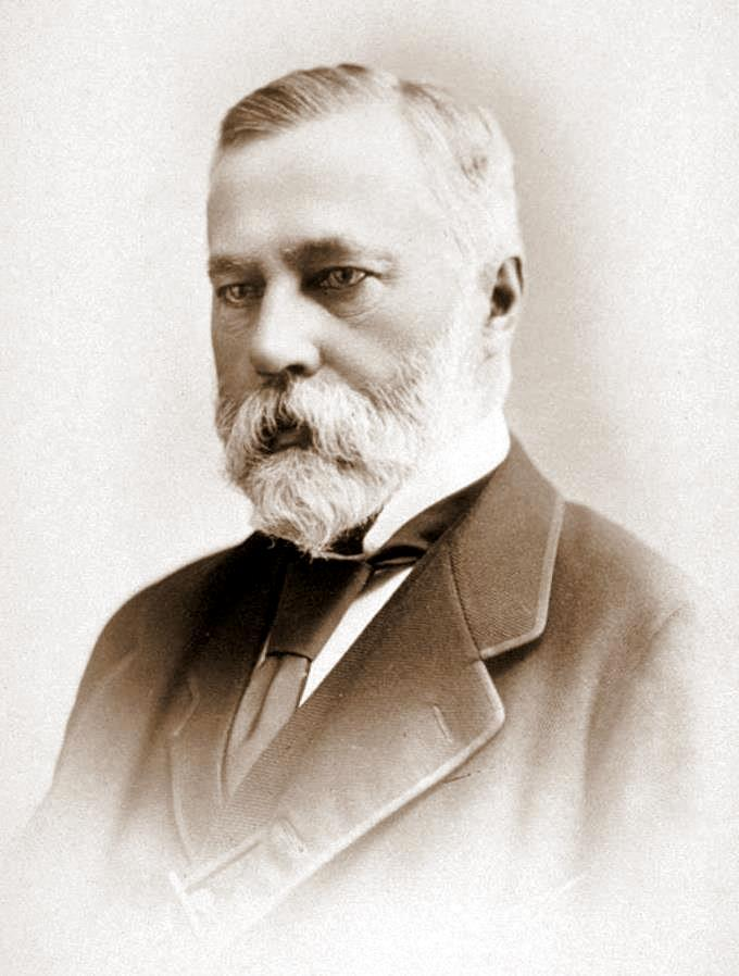 James Ben Ali Haggin